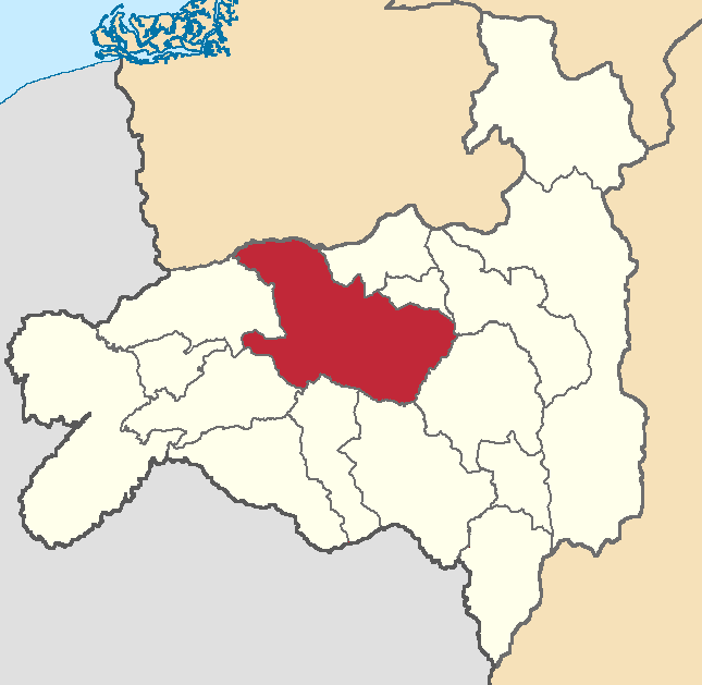 Mapa localizador del cantón en Loja, Ecuador